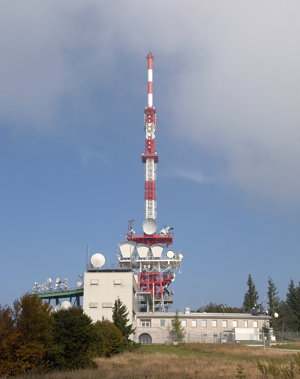 Gaisberg Transmitter: Antenna tower